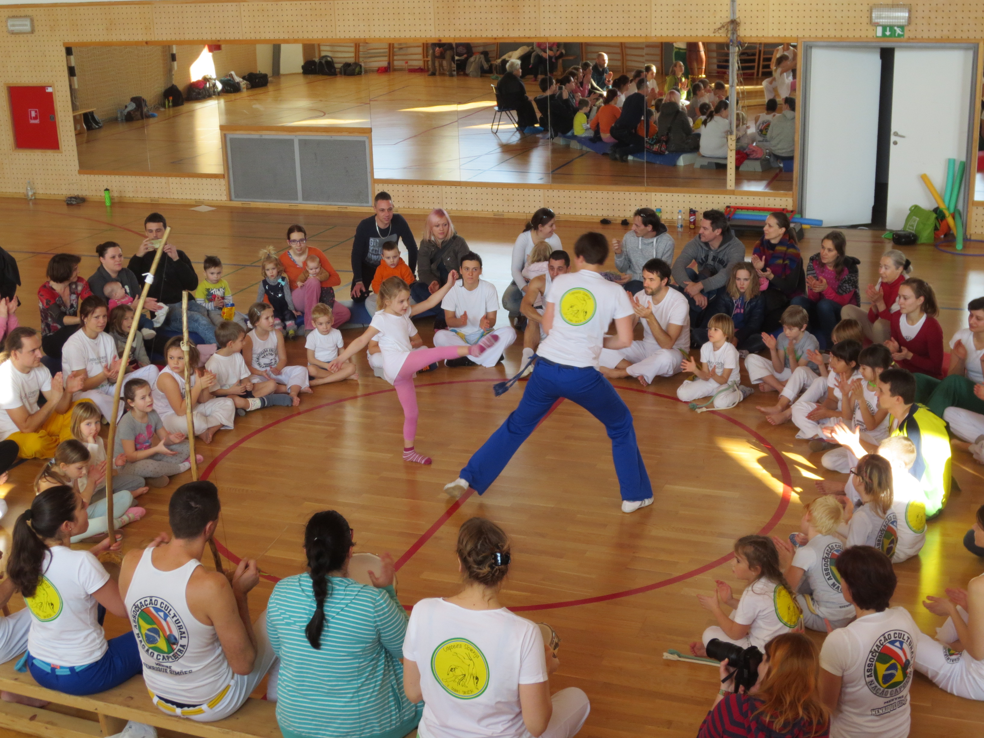 igra v krogu-Rodi, Capoeira Slovenija